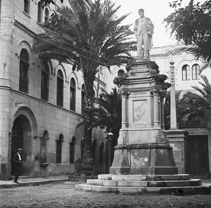 Monument a l'Arxiu Arnús de Badalona. Josep Salvany i Blanch (1911)